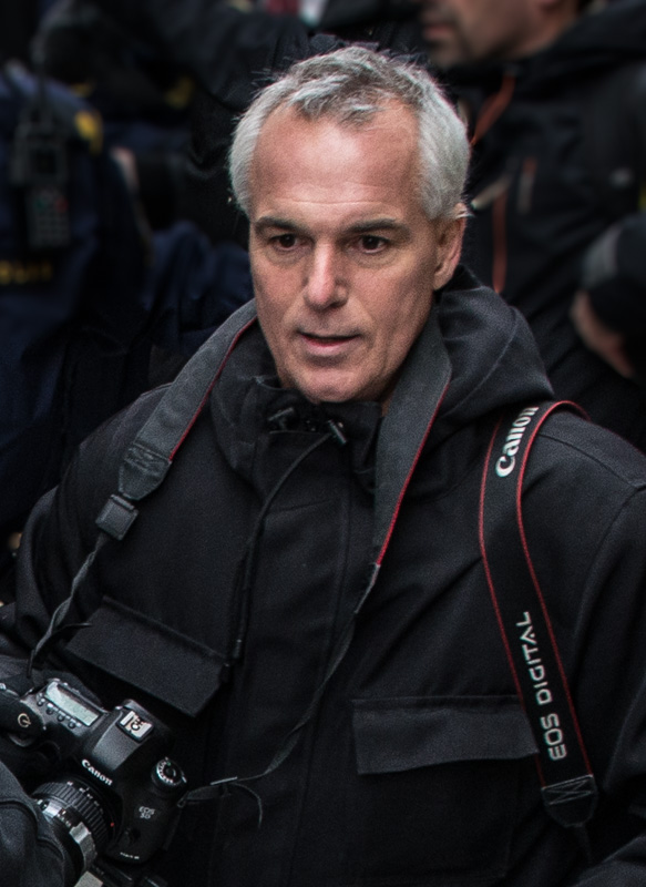 Paul Hansen under uppdrag 2014.